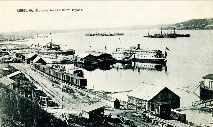 Кинешма. Промышленная часть города. Почтовая открытка. Издание Л.М.Гольдфейна. 1900-е г.г.